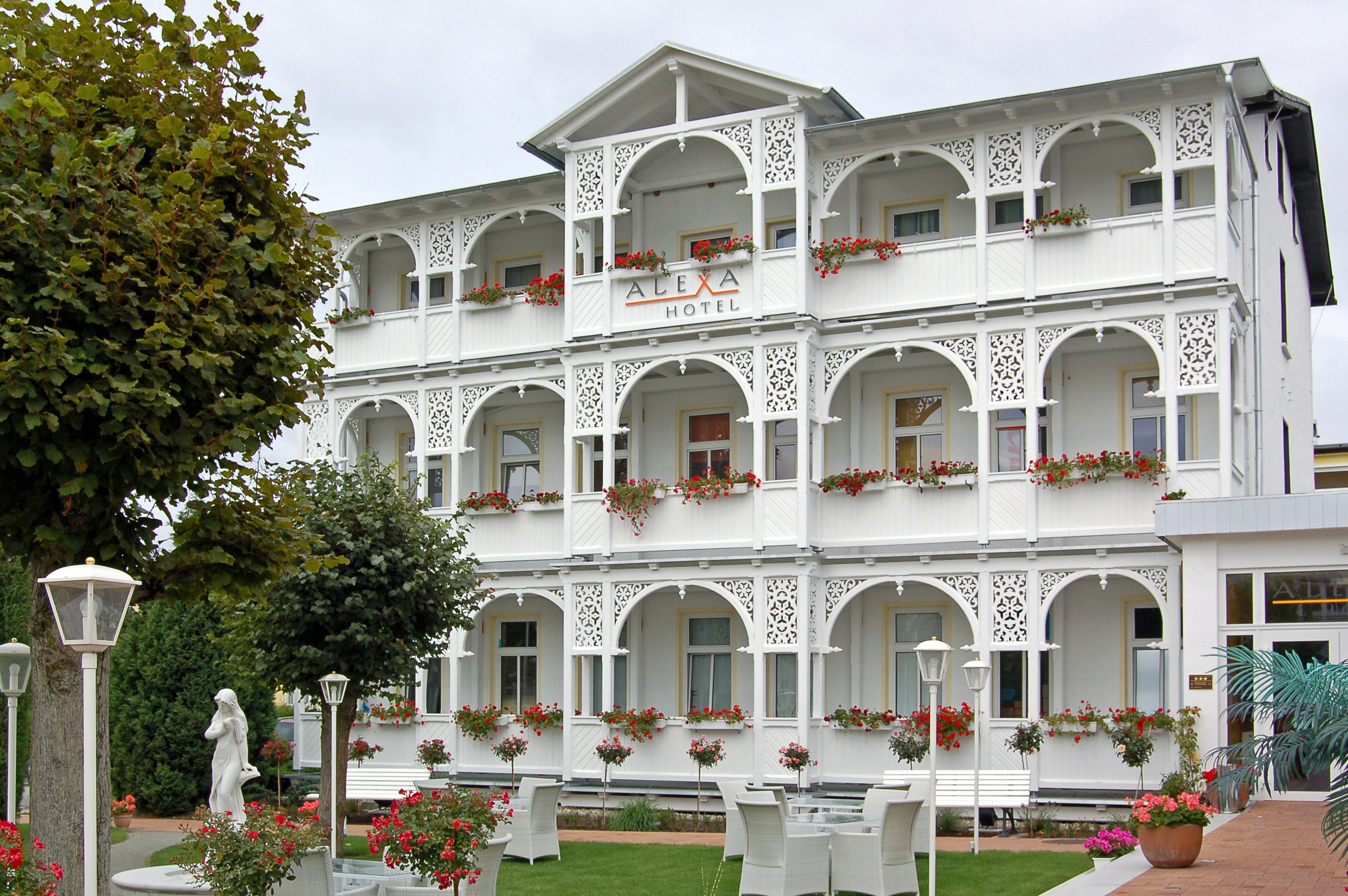 Einfach wunderschön sind diese hölzernen Ornamente. Die Gemeinde Göhren liegt auf der Halbinsel Mönchgut im Südosten der Insel Rügen. Göhren wurde 1165 erstmals erwähnt. Ab 1326 Teil des Fürstentums Rügen. Ab 1648 gehörte Rügen zu Schwedisch-Pommern. Göhren entwickelte sich im 19. Jh. zu einem der bedeutendsten Ostseebäder. Der Bau einer Schmalspurbahn sorgte ab 1899 zu einer weiteren Entwicklung des Tourismus. Zu den Sehenswürdigkeiten des Ortes gehören die Seebrücke, mehr als 5 km langer und 30 m breiter Strand und natürlich die sog. Bäder-Architektur. Haupteinnahmequelle ist natürlich der Tourismus. Fischerei spielt keine große Rolle mehr. Seit der »Wende« wurde viel renoviert - vor allem die in der Bäder-Architektur errichteten Bauten wurden mit viel Liebe restauriert.